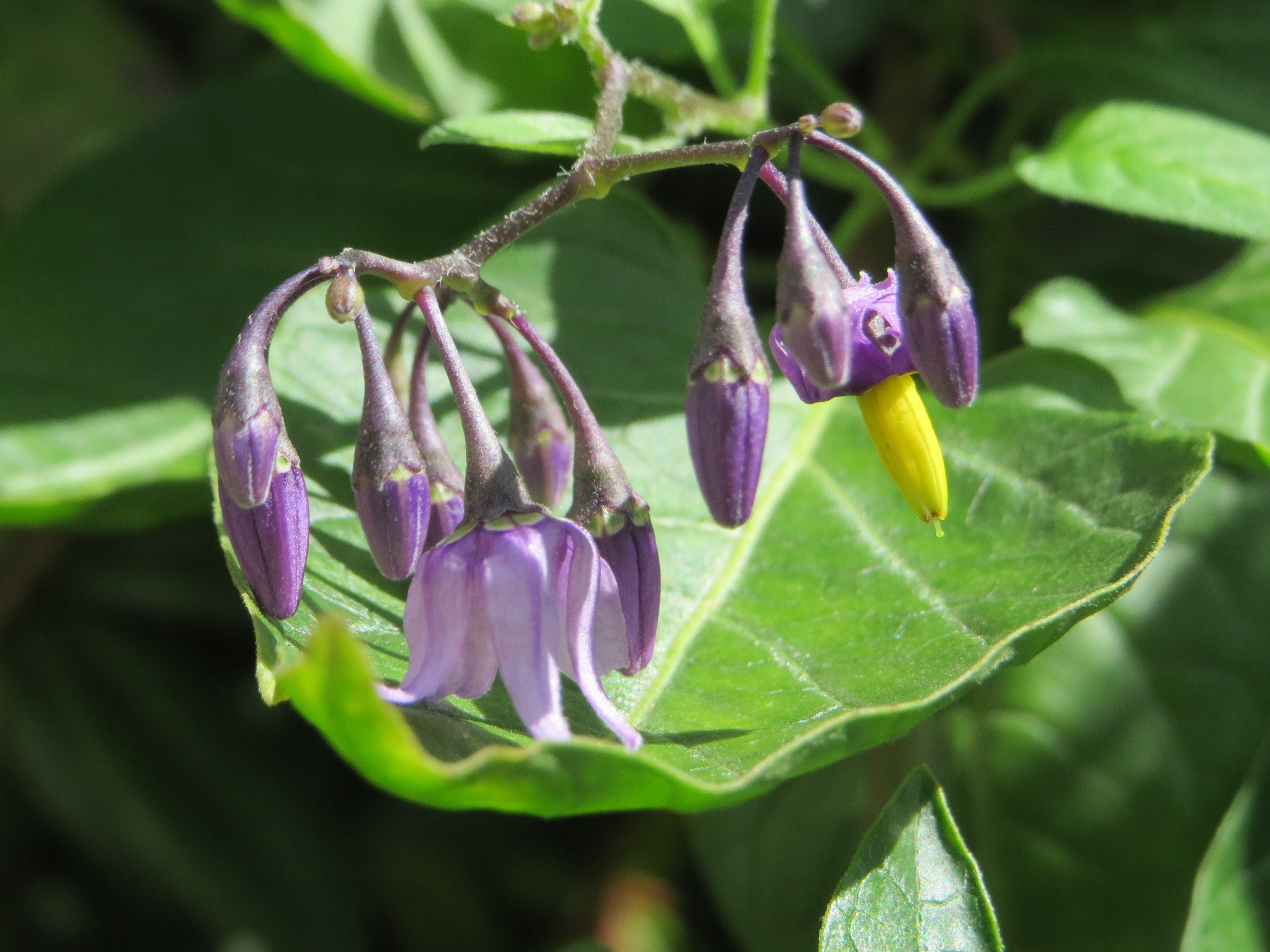 Bittersüßer Nachtschatten (Solanum dulcamara) in Saarbrücken